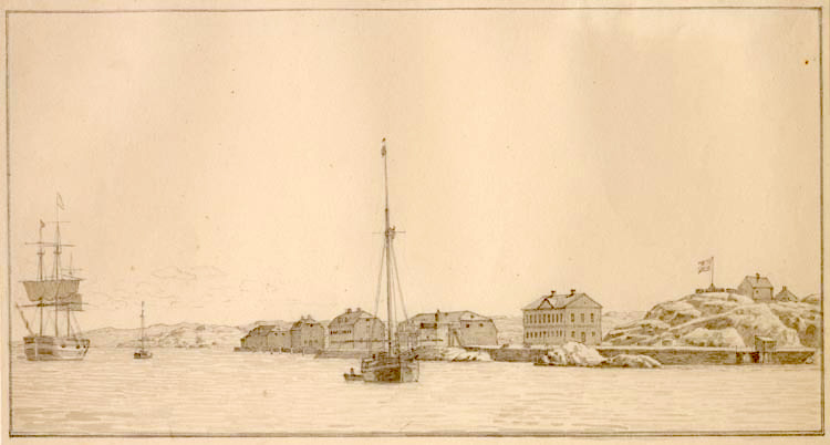 Känsö karantänsanläggning. Drawing. Pencil, brush and grey wash